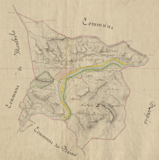 L'antic terme de Palaldà en el Cadastre napoleònic del 1812 (Arxius Departamentals dels Pirineus Orientals)